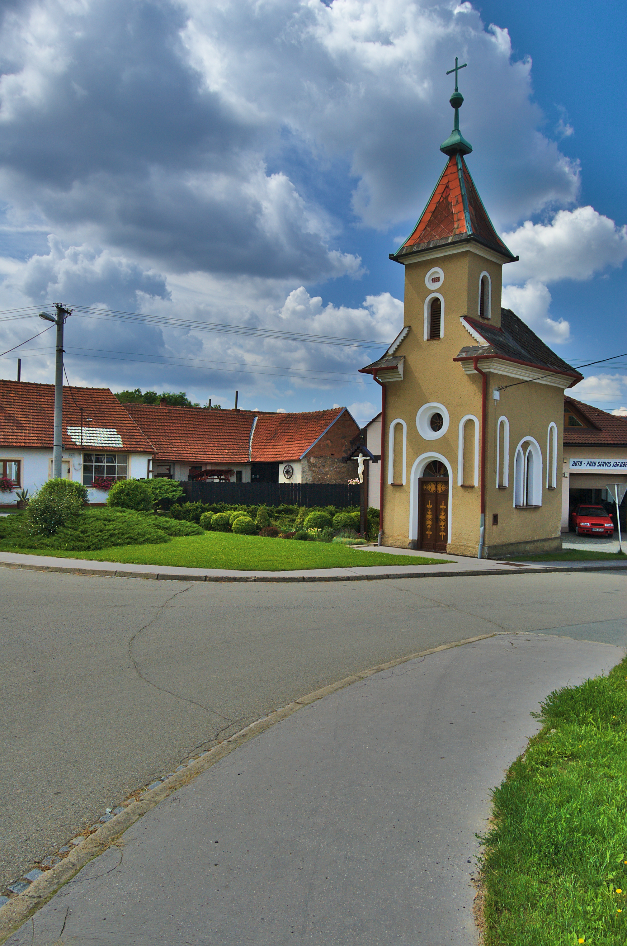 Kaple, Vratíkov, Boskovice, okres Blansko